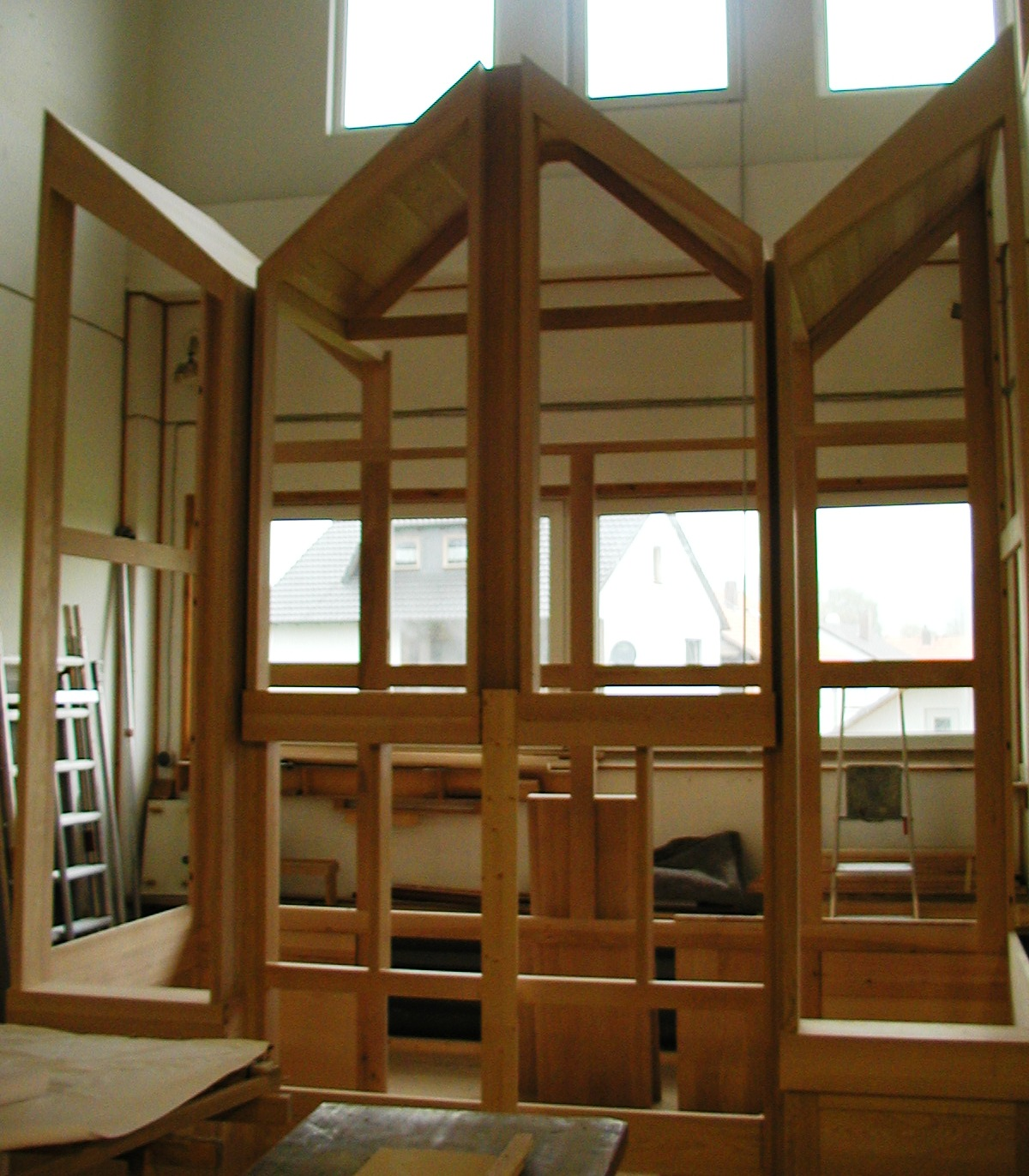 Orgelrohbau - fotografiert 10/2006 in der Orgelbauwerkstatt Krawinkel (Teindelburg). Erstellt von Benutzer:Kantor.JH